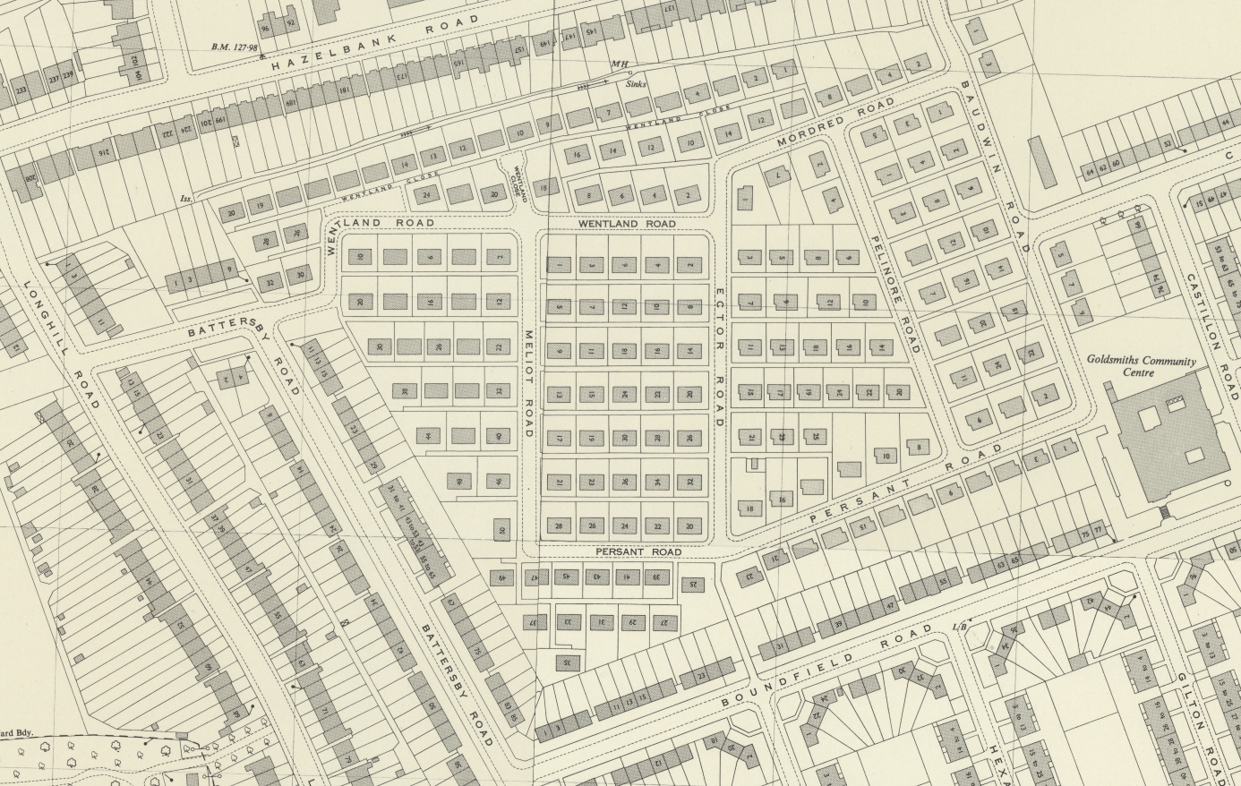 Excalibur Estate, Catford, London.